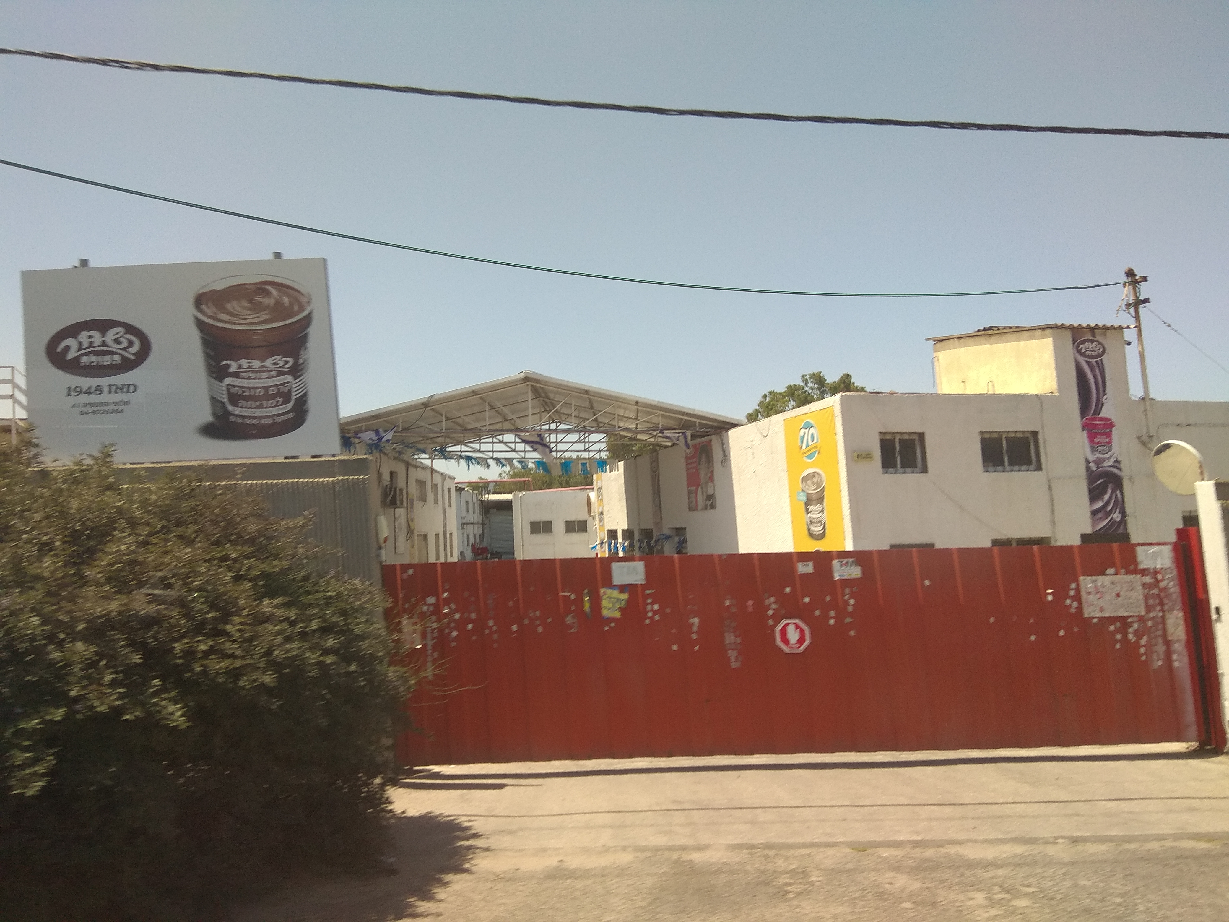 מפעל השחר העולה, 2018